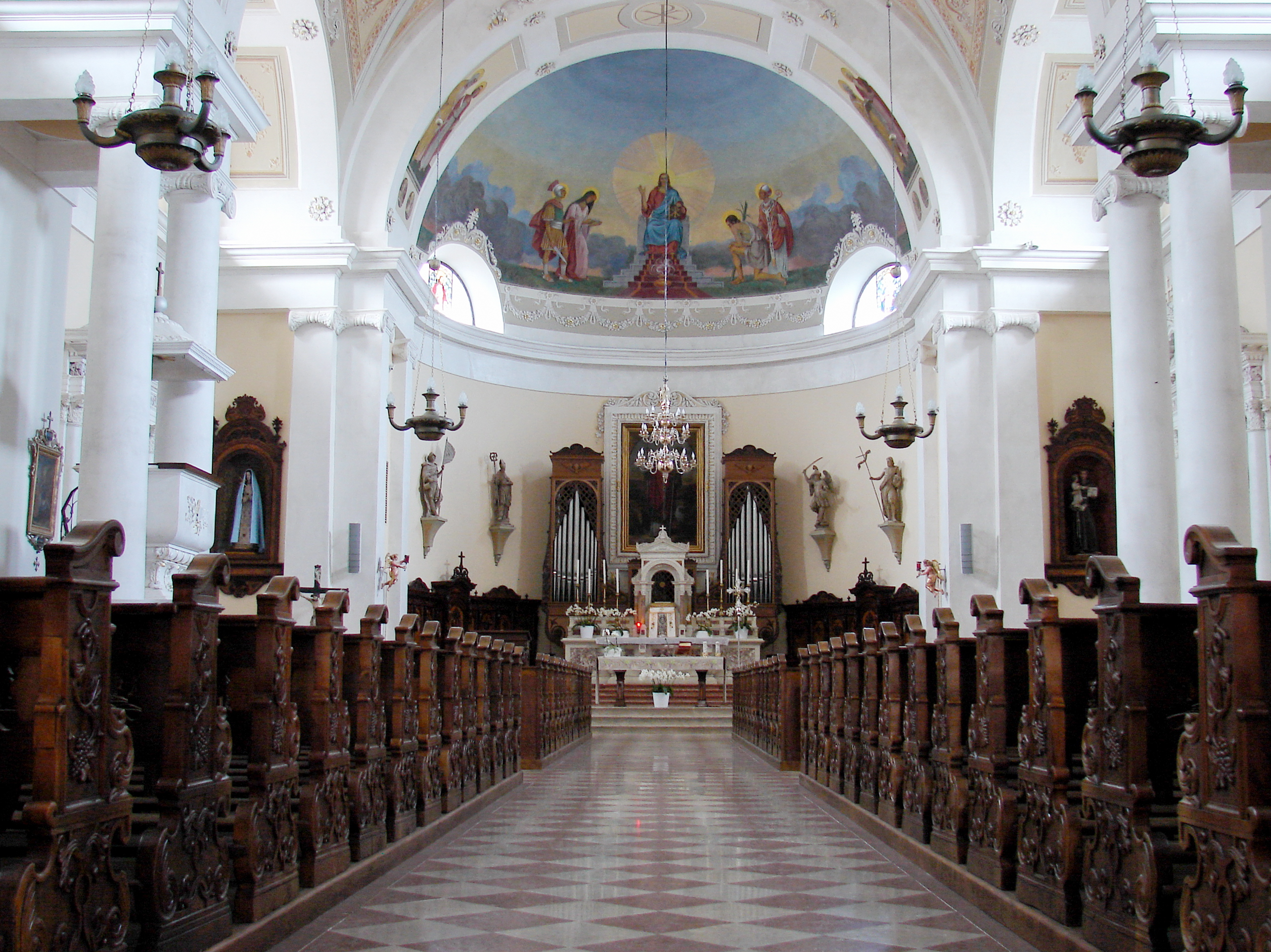 Kirche San Martino in Fondo